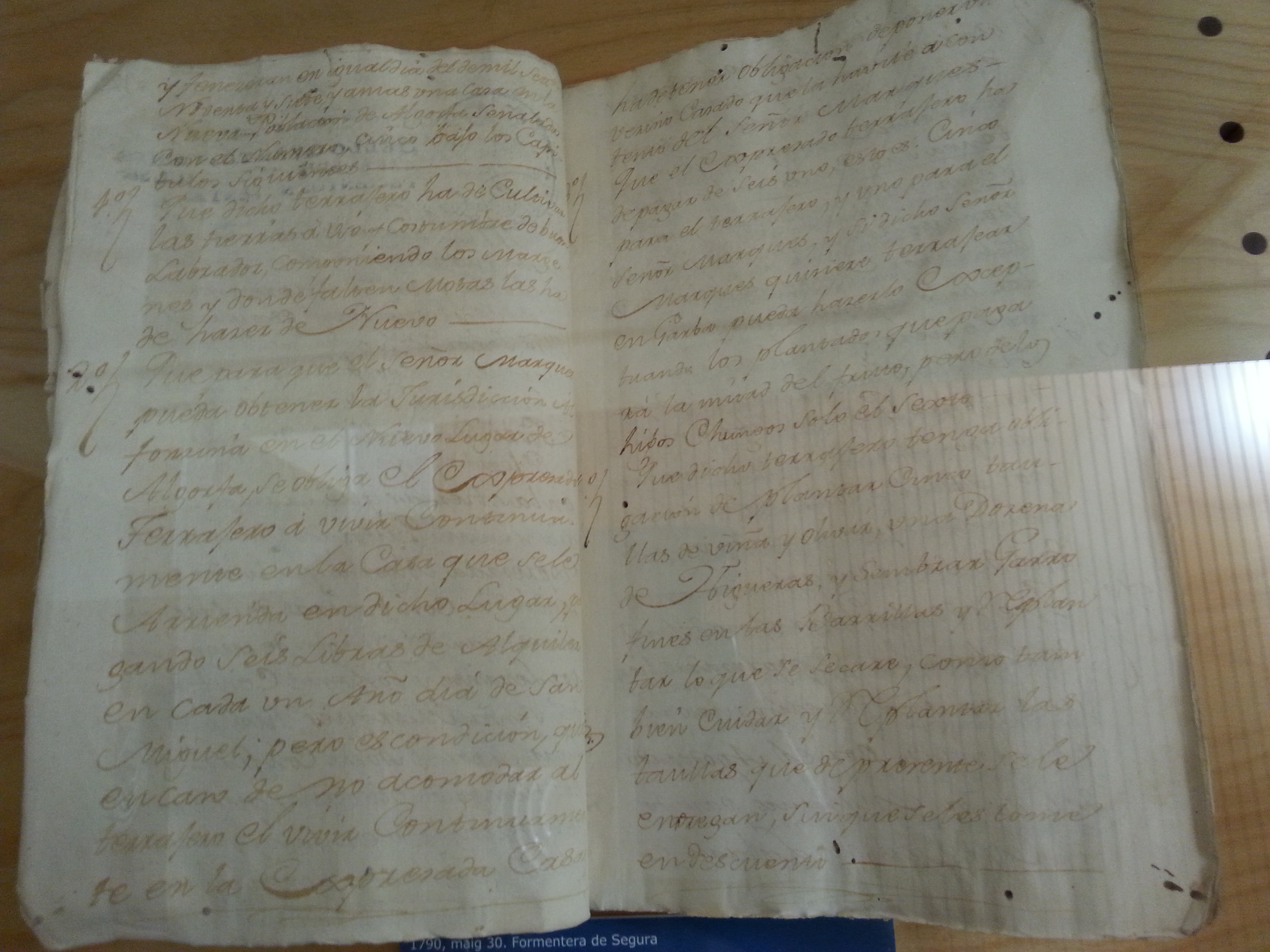 Contracte de "terraje" de Formentera del Segura signat ente n'Ignasi Pérez de Sarrió, senyor de Formetera i marqués d'Algorfa i Gaietà Aledo, veí d'Algorfa. El senyor va a presentar el testimoni de 16 contractes com aquest a la Reial Audiència de València per a sol.licitar la jurisdicció alfonsina sobre Algorfa (30 de maig de 1790). ARV: Escrivanies de Cambra, 1790, expedient 210. Arxiu del Regne de València.